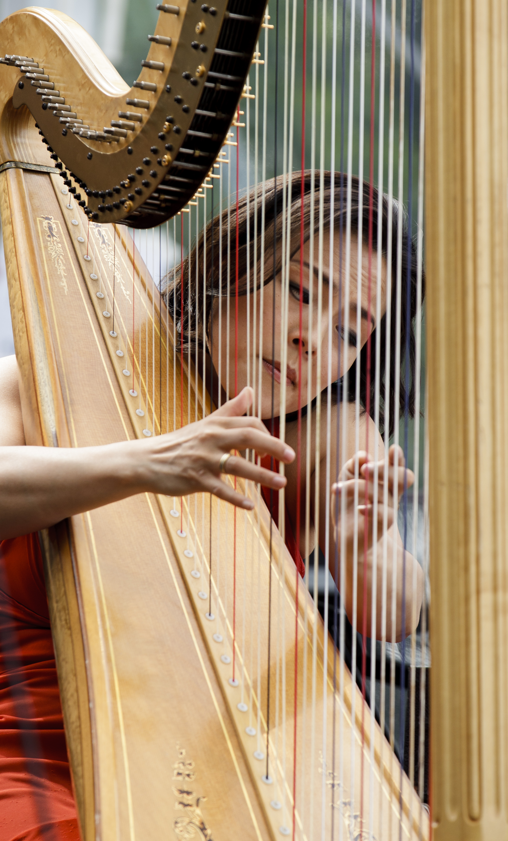 Lavinia Meijer tijdens het Nationaal Concert 2011